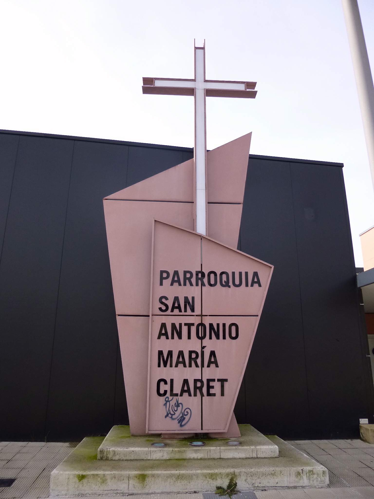 Iglesia de San Antonio María Claret (Pamplona)